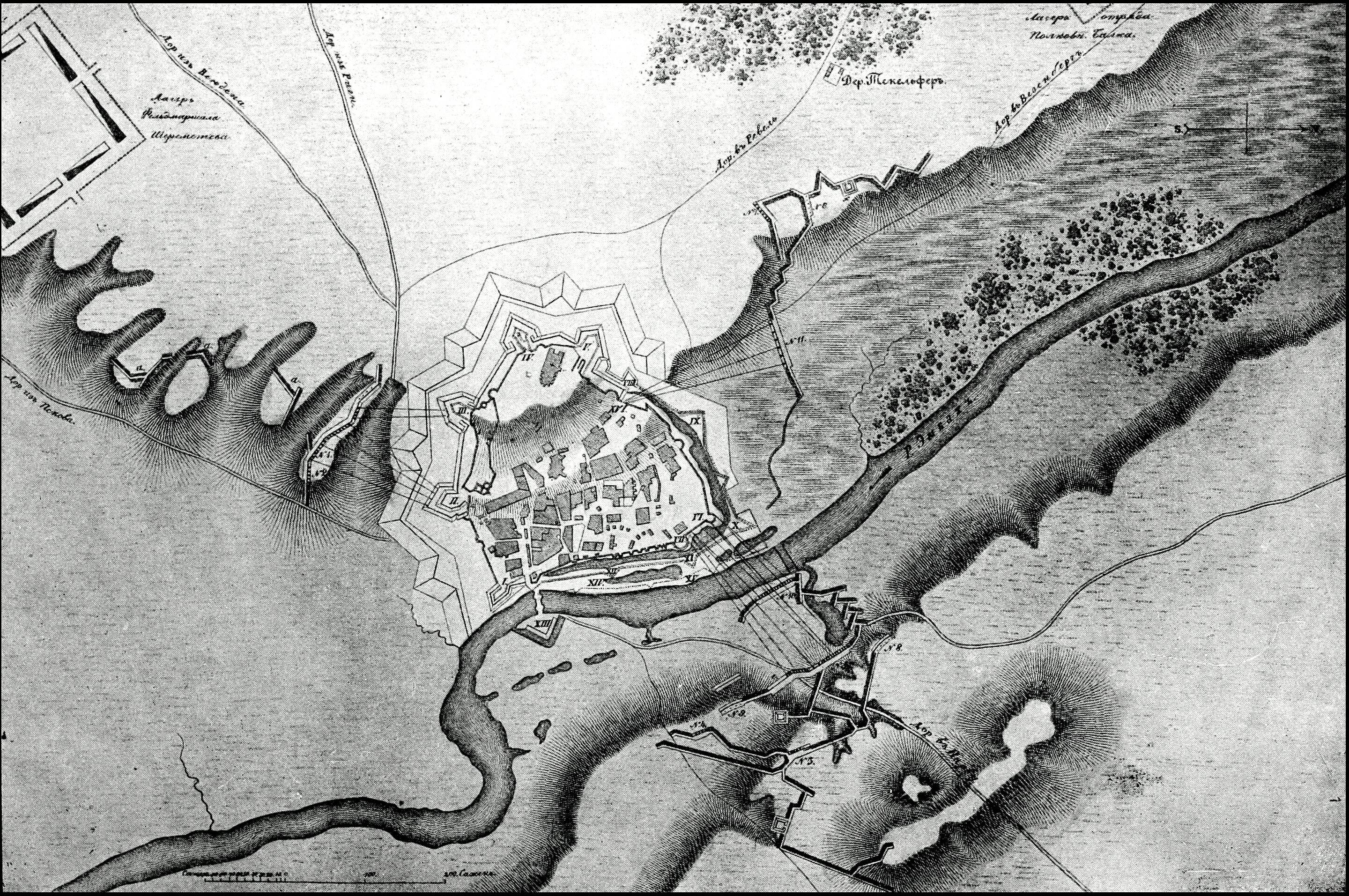 План осады Дерпта в 1704 году. Это изображение было использовано для иллюстрирования статьи «Дерпт» опубликованной в девятом томе «Военной энциклопедии», который был издан книгоиздательским товариществом И. Д. Сытина в 1912 году в столице Российской империи городе Санкт-Петербурге.